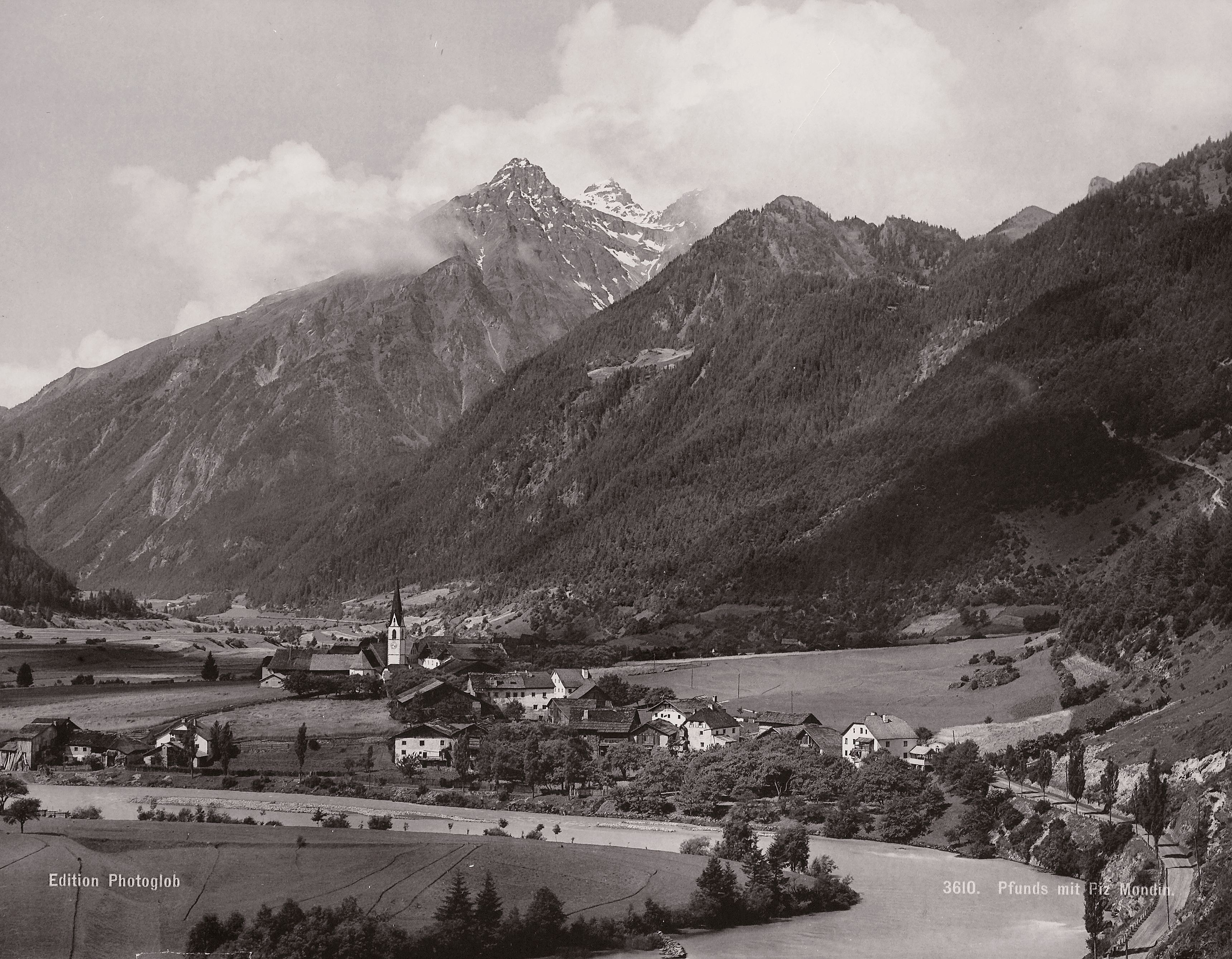 Pfunds mit Piz Mondin. Fotografie : Bromsilber-Abzug